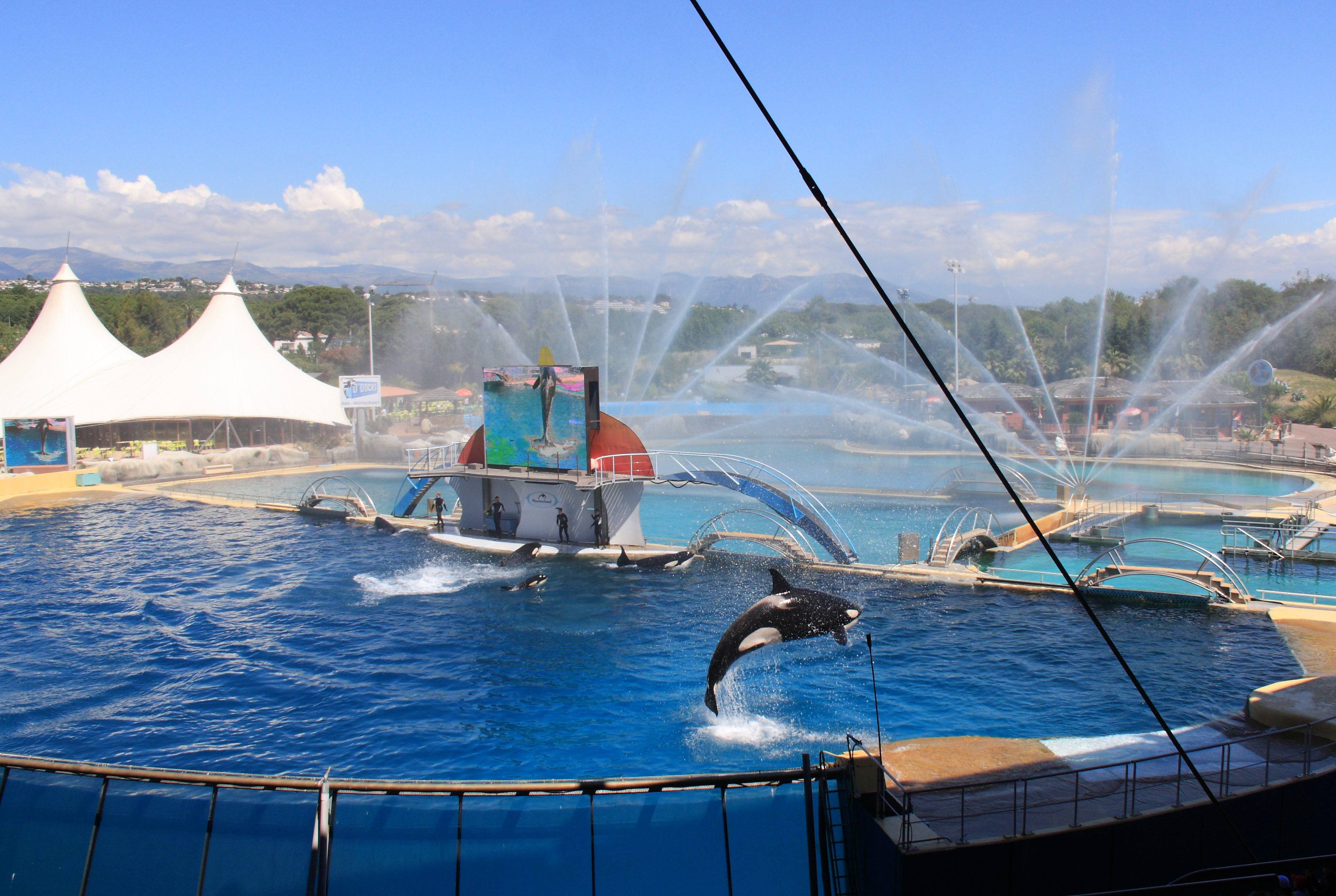 Vue globale des bassins des orques du Marineland d'Antibes